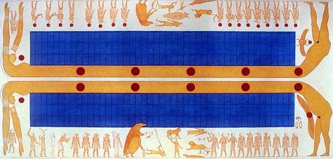 Représentation astronomique figurant sur le plafond de la tombe de Ramsès VII dans la vallée des rois.